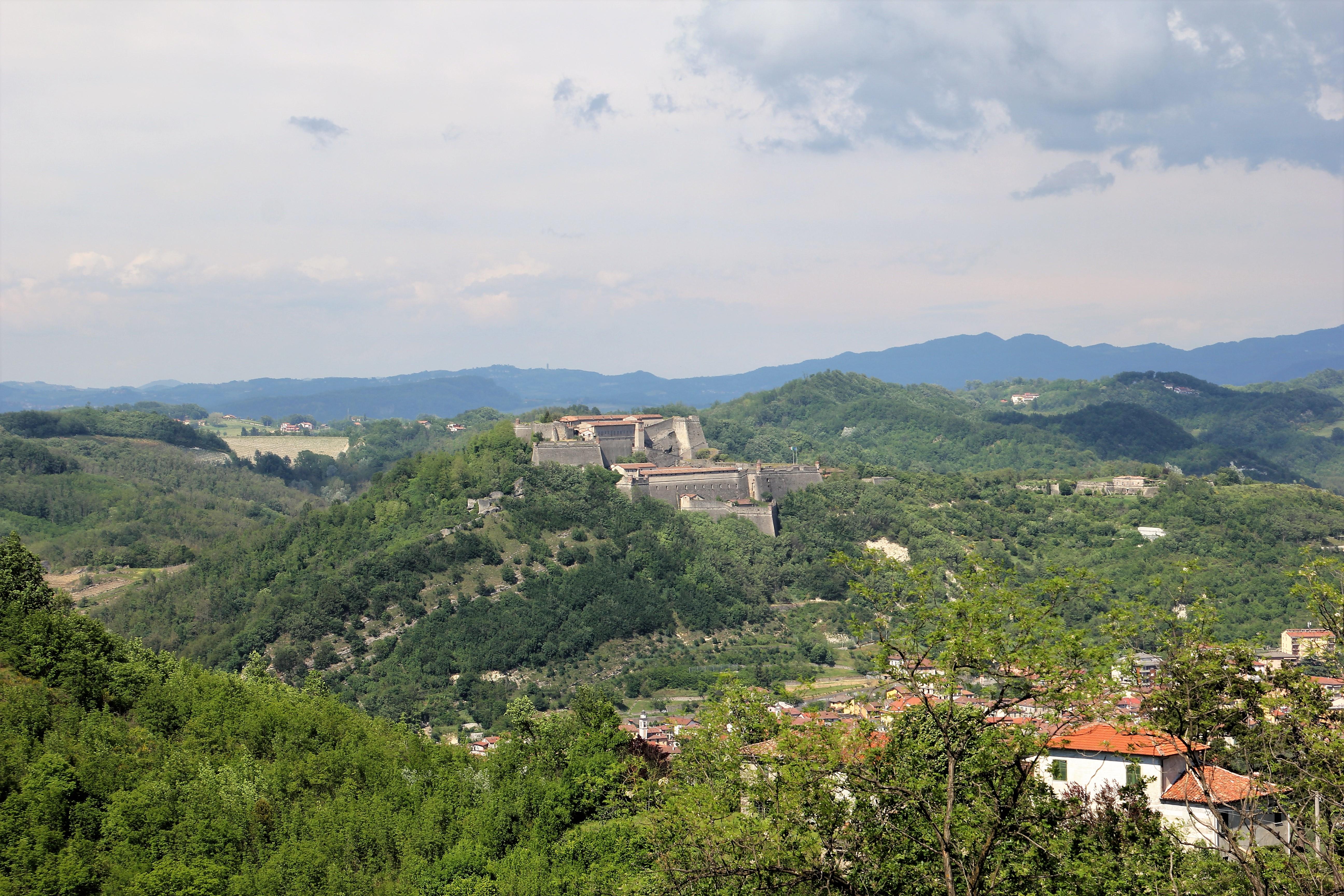 Il forte di Gavi